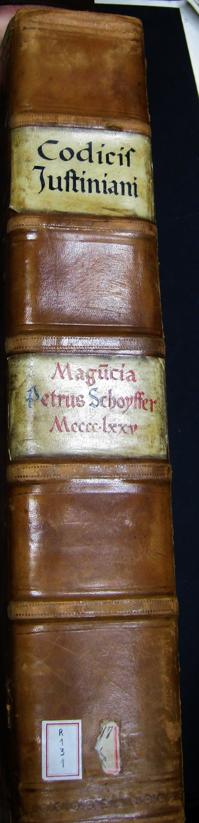 Codex Iustiniani(Corpus iuris civilis) Edició: de Petrus Schoyffer de 1475 Source: Bibloteca Arús (Barcelona)